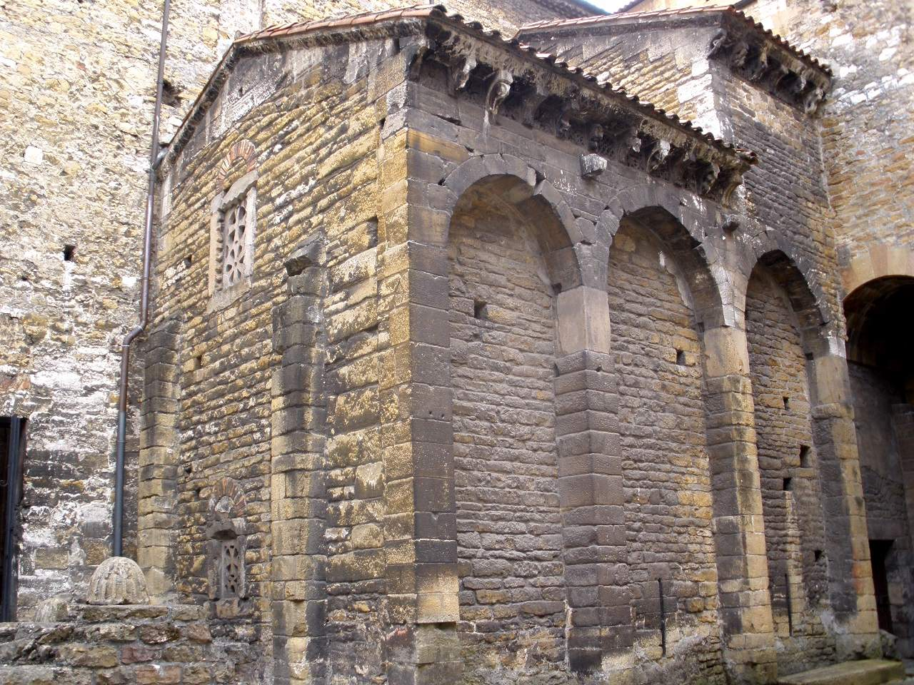 Cripta de Santa Leocadia, en la Catedral de Oviedo